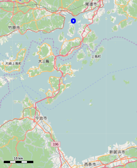 広島県三原市の宿禰島 This map may be incomplete, and may contain errors. Don't rely solely on it for navigation.